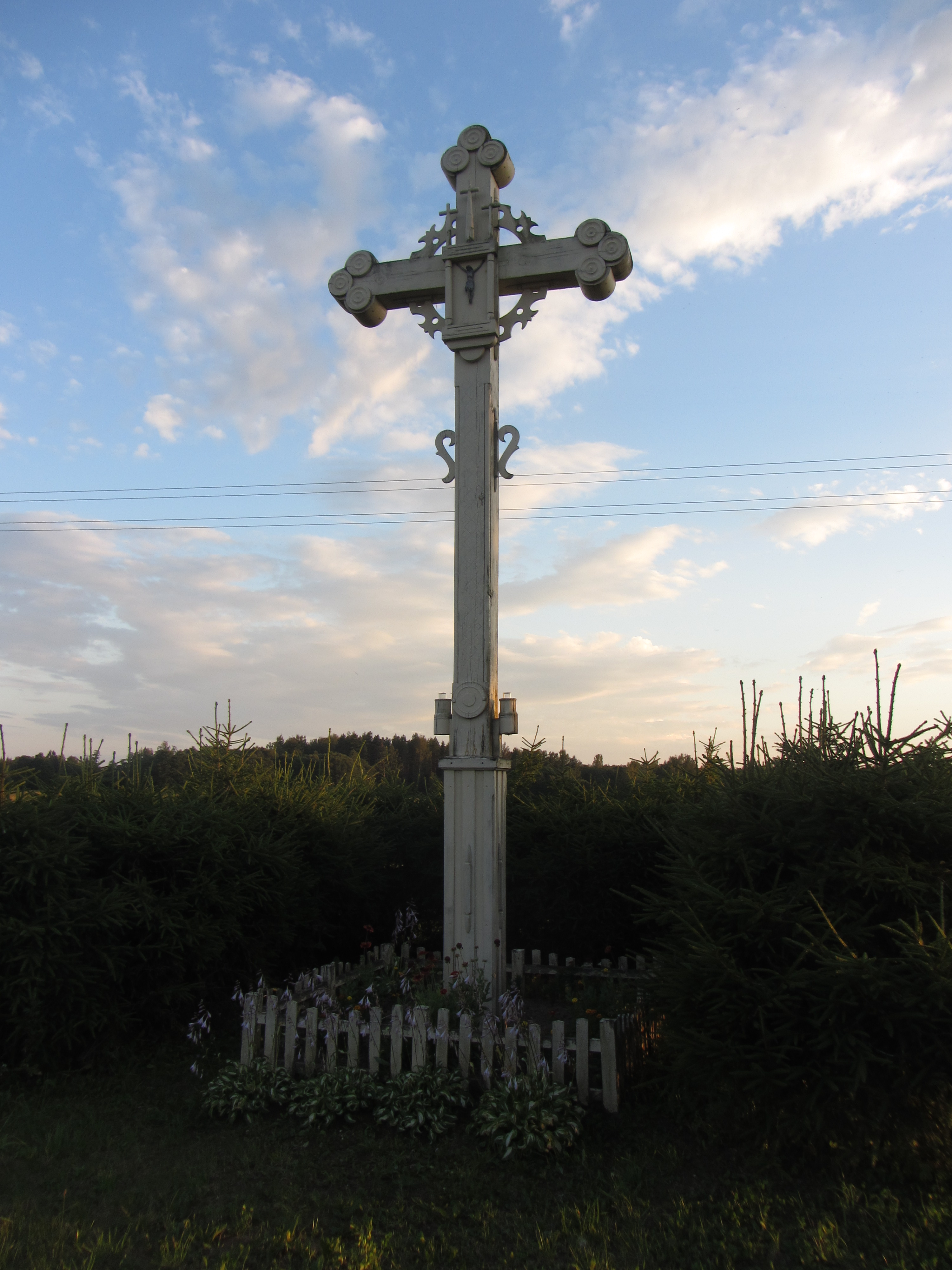 Daugailių sen., Lithuania